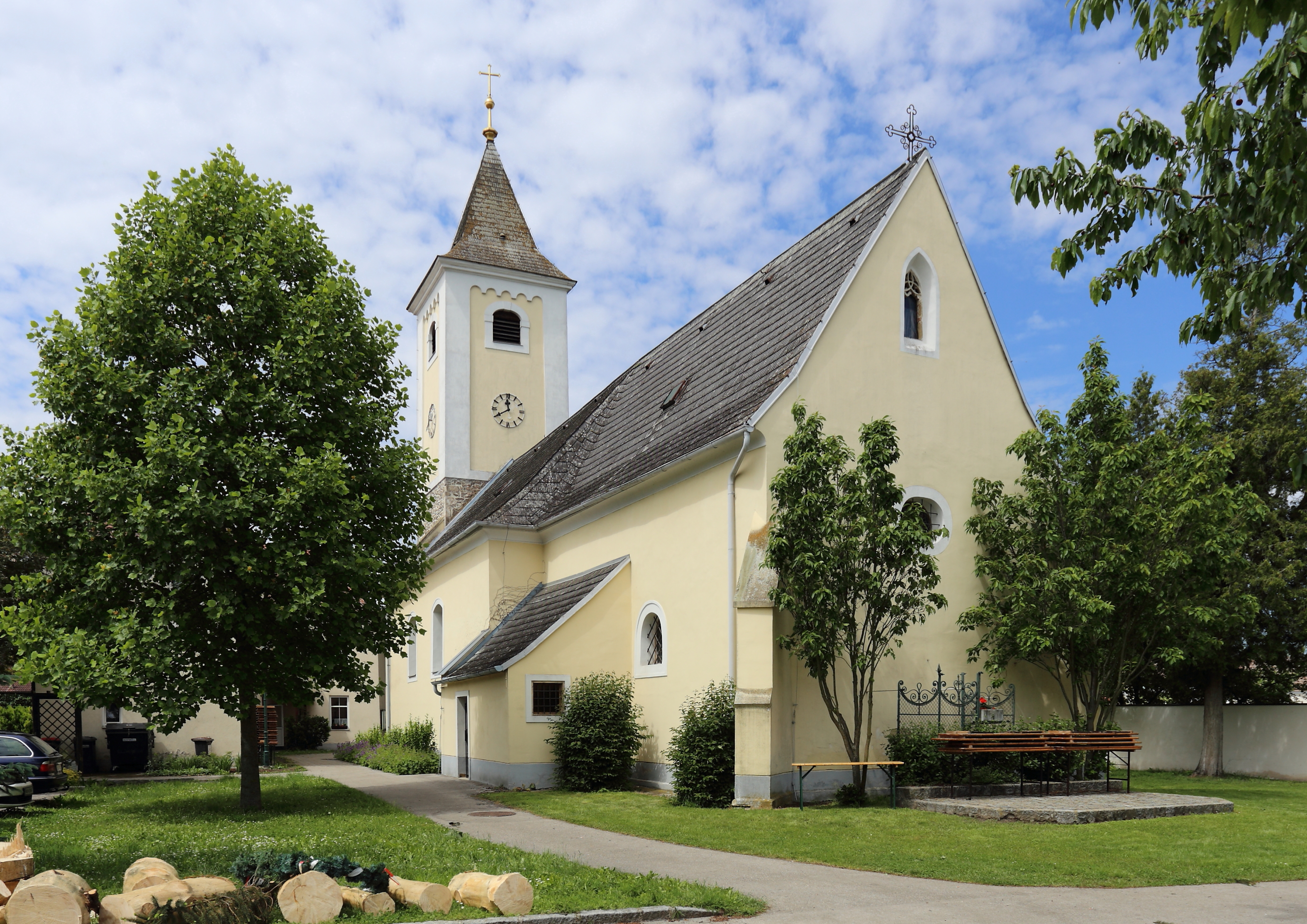 Südostansicht der katholischen Pfarrkirche Mariae Himmelfahrt in Neuaigen, ein Ortsteil der niederösterreichischen Stadt Tulln. Ein gotischer Bau aus der 1. Hälfte des 14. Jahrhunderts, wobei das Langhaus sowie der Rechteckchor zur Barockzeit (1738/40) umgebaut und dem vorgestellten, quadratischen Turm ein Glockengeschoß aufgesetzt wurde.